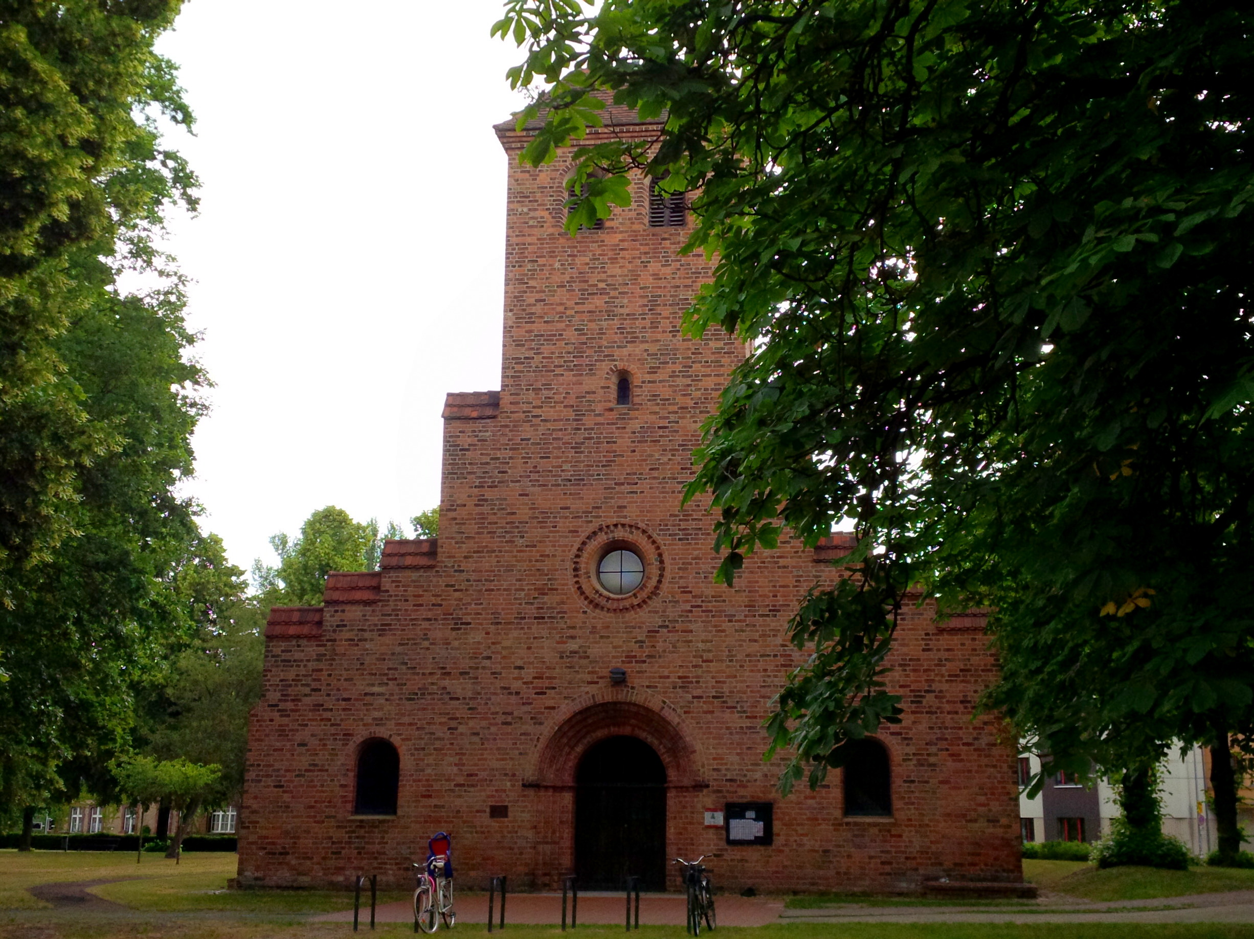 st. nicolai in brandenburg an der havel, wetsportal